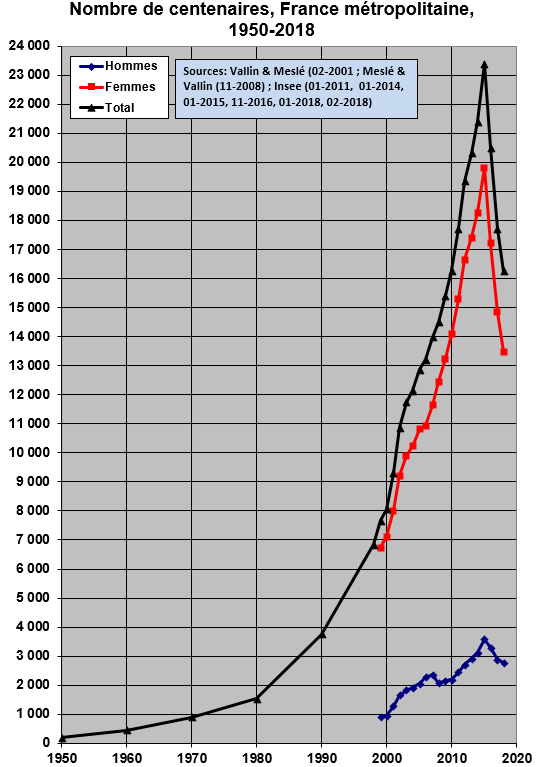 Nombre de centenaires en France métropolitaine au 1er janvier 1950 à 2018